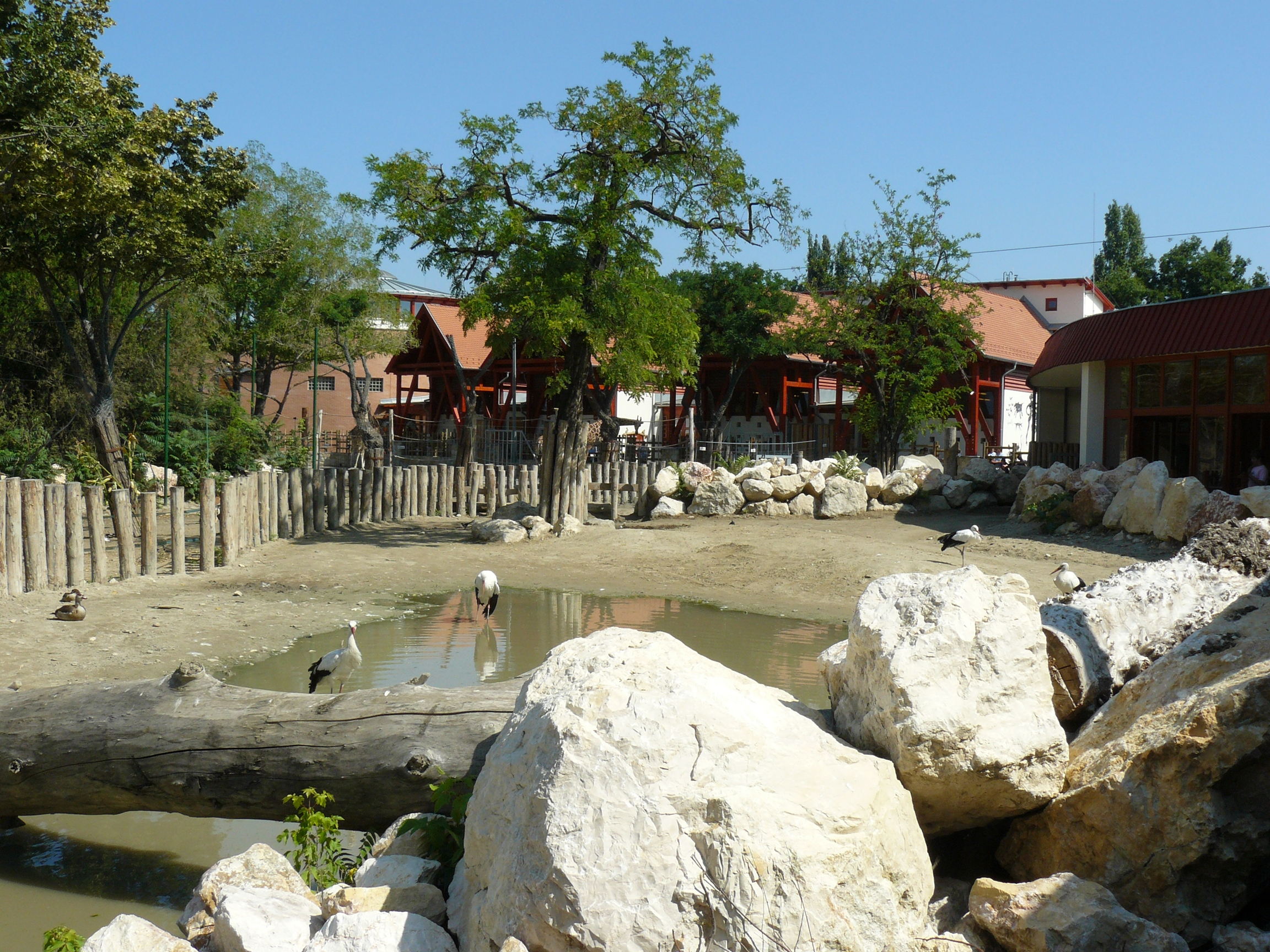 A szavannakifutó kis tavacskája a vízi madaraknak a Fővárosi Állatkertben (Budapest)